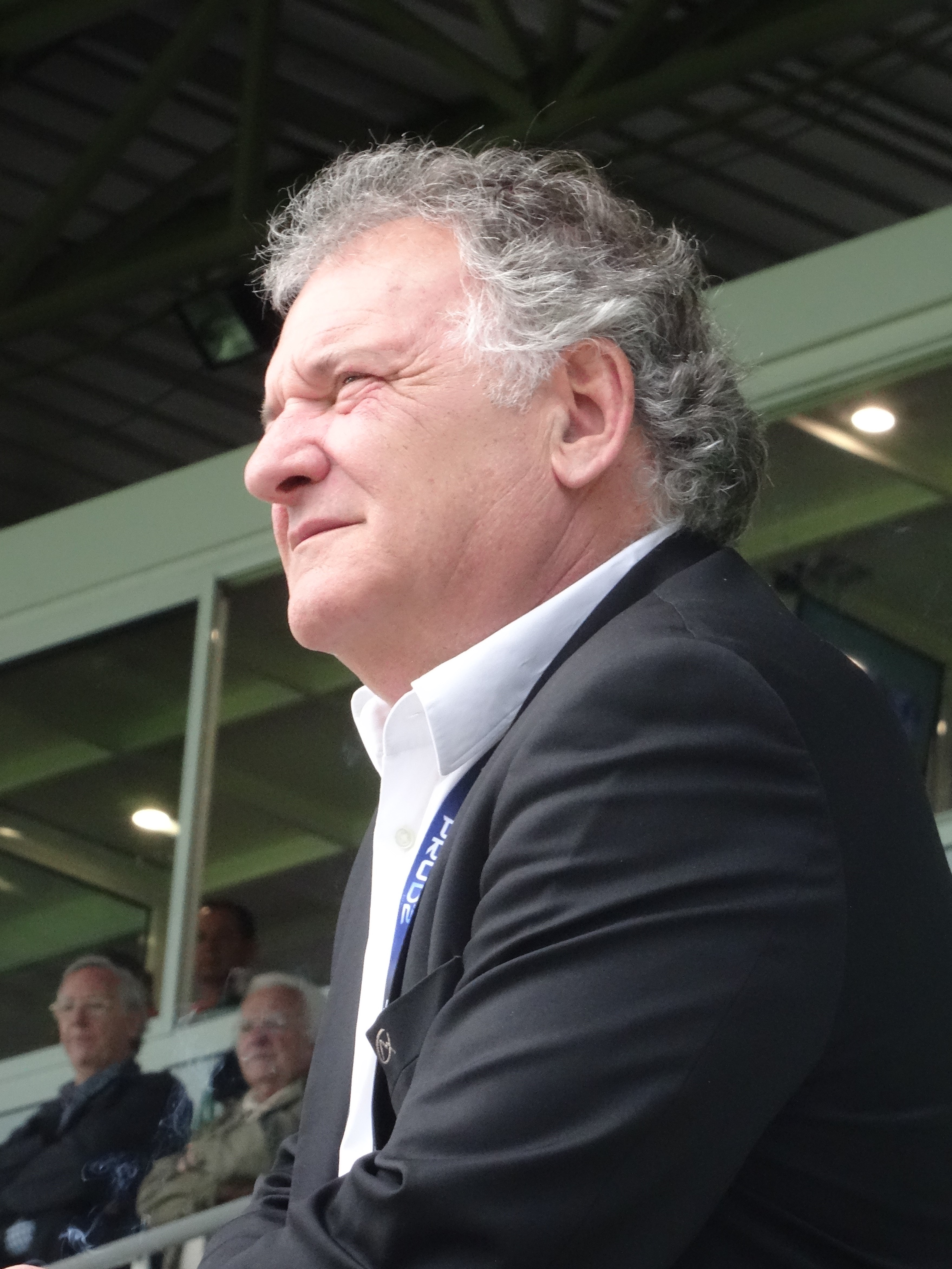 Bernard Pontneau en 2016.